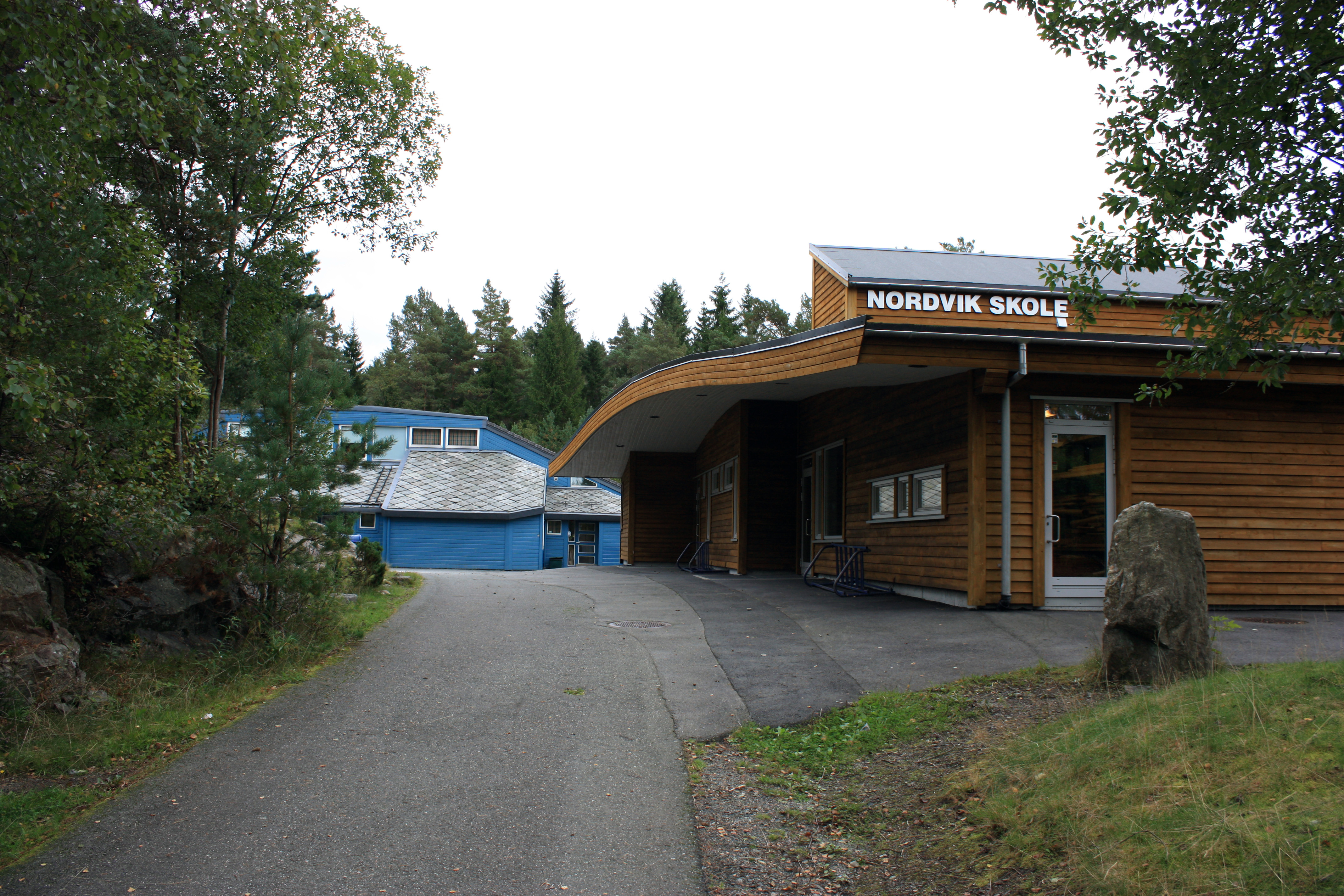 Nordvik skole, Fana, Bergen.